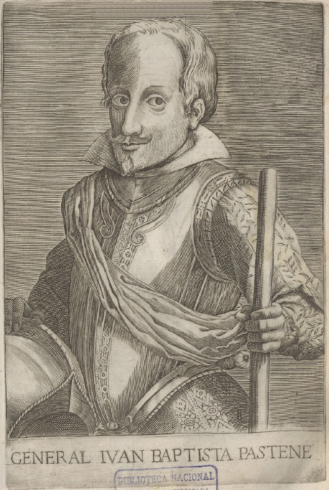 Juan Bautista Pastene:uno de los conquistadores y exploradores de Chile.